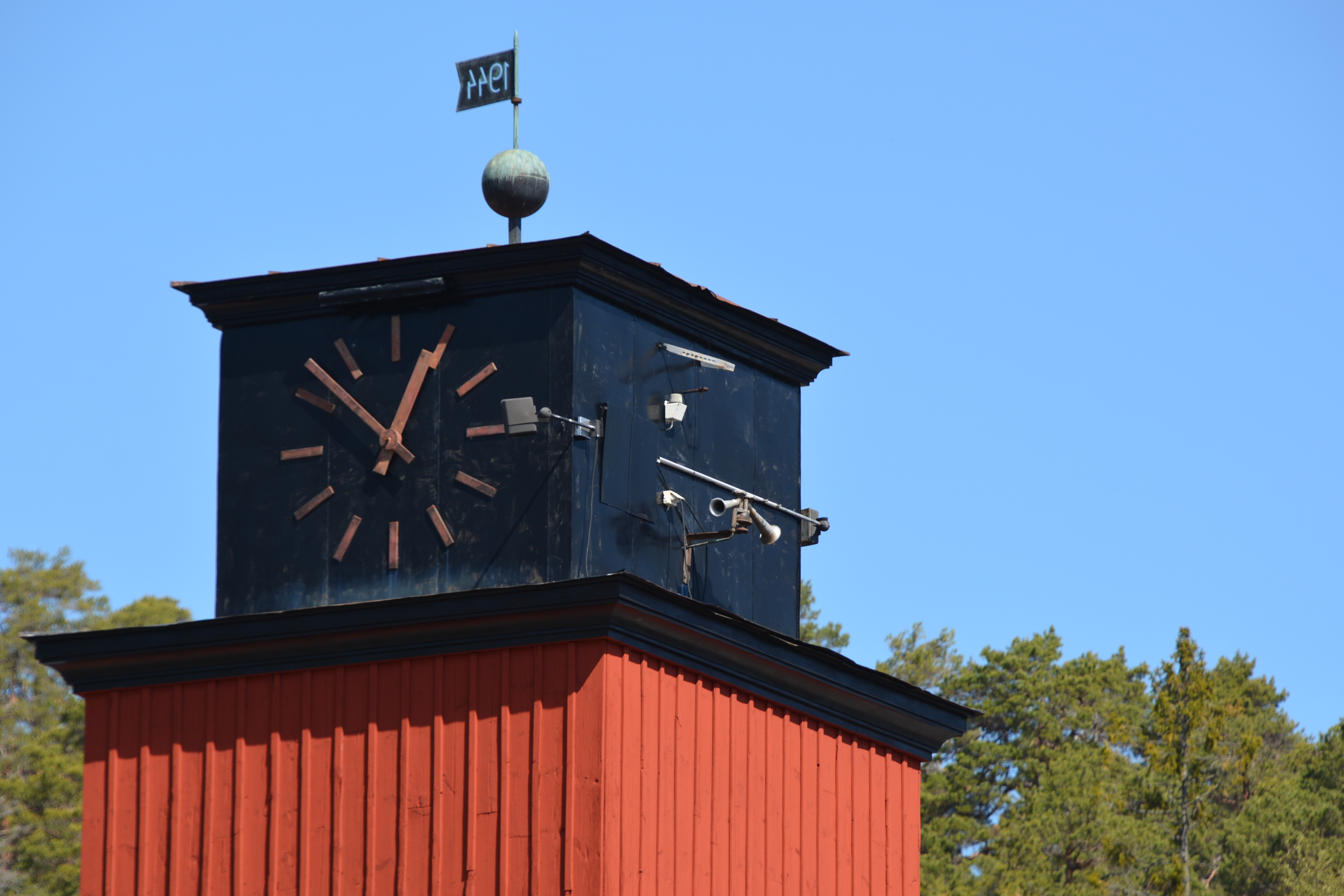 Gamla brandstationen Gusum, tormet